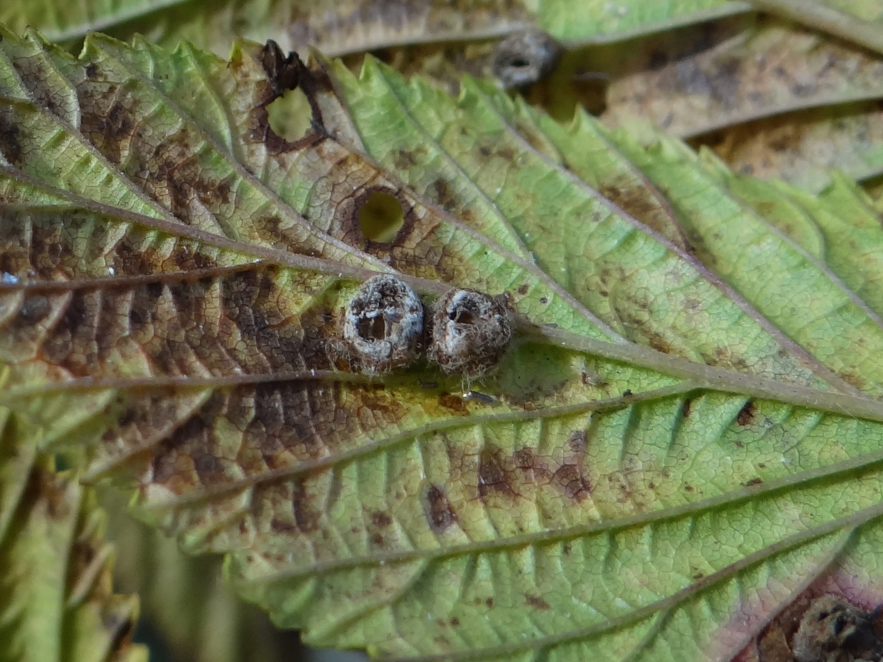 Dasineura ulmaria on Filipendula ulmaria. Location: Poland, Szczawnica